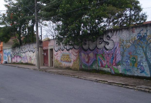 Escola Estadual Carlo Góes, Bairro Boa Vista, Belo Horizonte, Minas Gerais, Brasil.